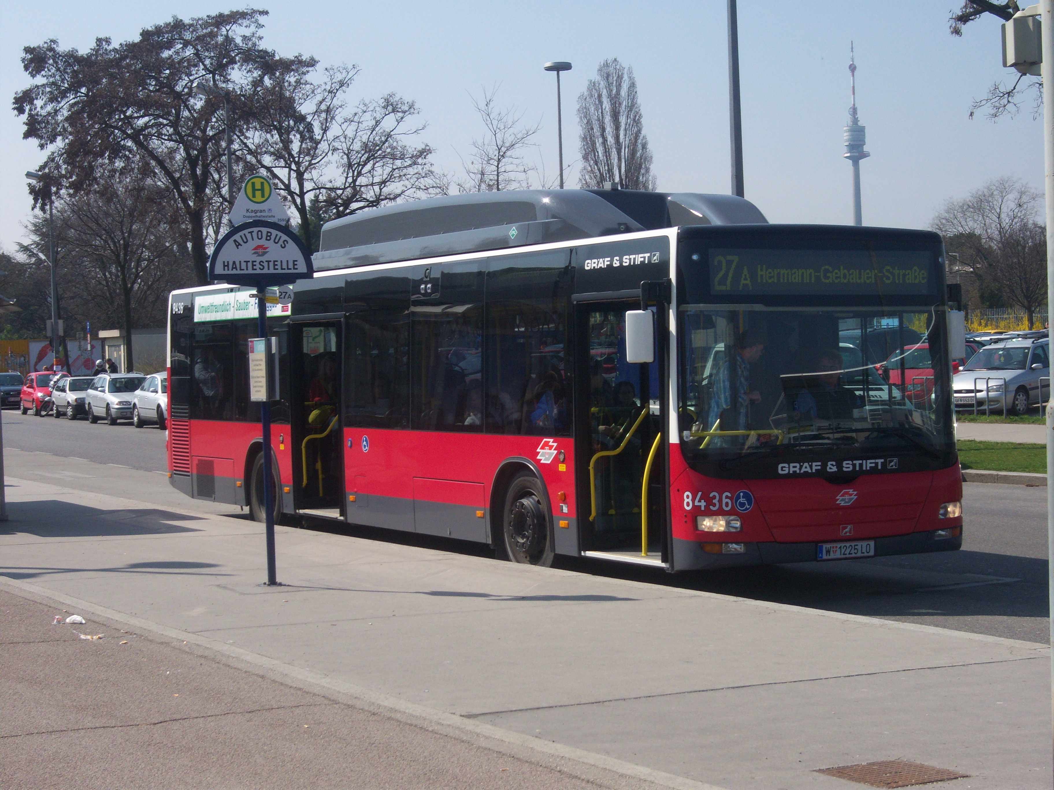 Linie 27A an der Station Kagran